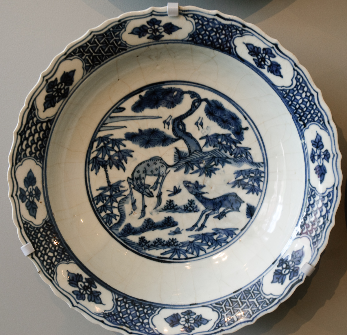 Zaal met Swatow-schalen en Martavanen Chinees bord